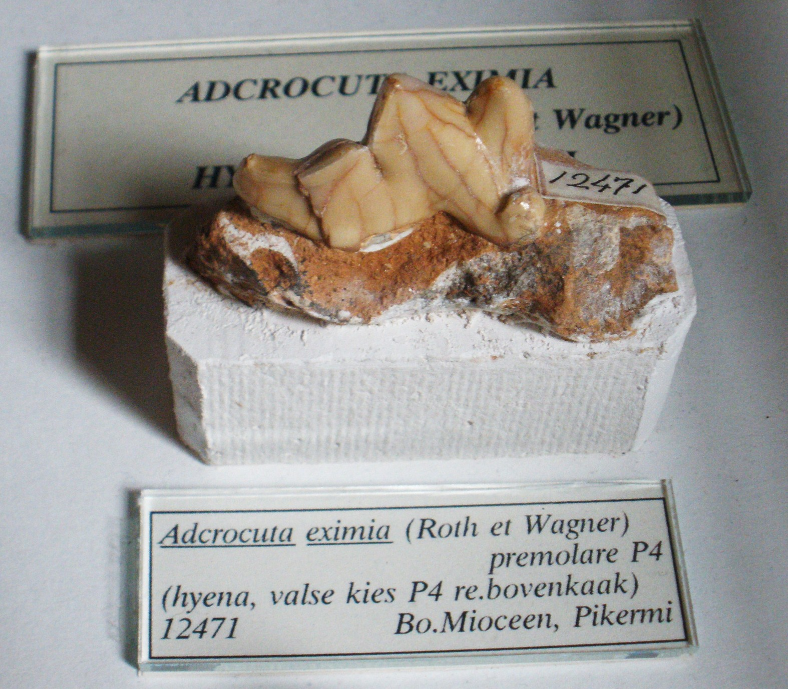 Fossil of Adcrocuta, an extinct hyaenid - Took the photo at Teylers Museum, Haarlem